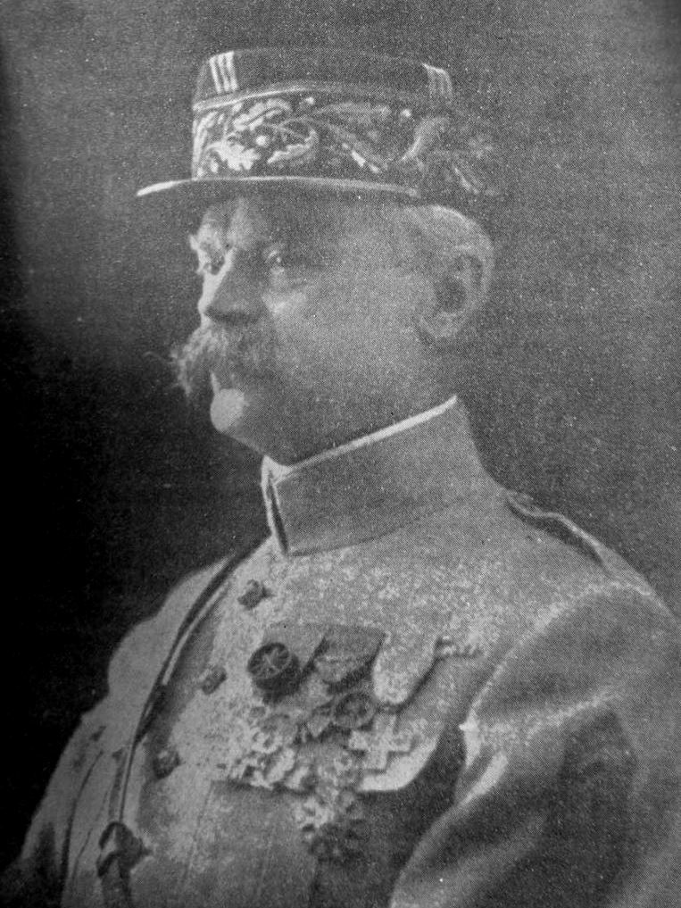 Gral. Paul Clément, fundador y primer Director de la Escuela Militar de Chorrillos